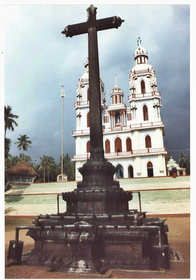 Steinkreuz, Wallfahrtskirche St. Mary`s Forane Kuravilangad, Kerala, Indien